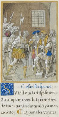 Cote cliché : 02-016044 N° d’inventaire : Ms764-folio21 Fonds : Miniatures et enluminures Titre : Liber Tertius Caesaris Description : Troisième livre des Commentaires de la Guerre Gallique de César par François Demoulins. Les Préfets et les tribuns militaires retenu par les Gaulois en échange pour les otages pris par les romains Auteur : Godefroy le Batave (connu de 1516 à 1524) Ecole : Ecole française Période : 16e siècle Date : 1520 Technique/Matière : enluminure, parchemin Localisation : Chantilly, musée Condé